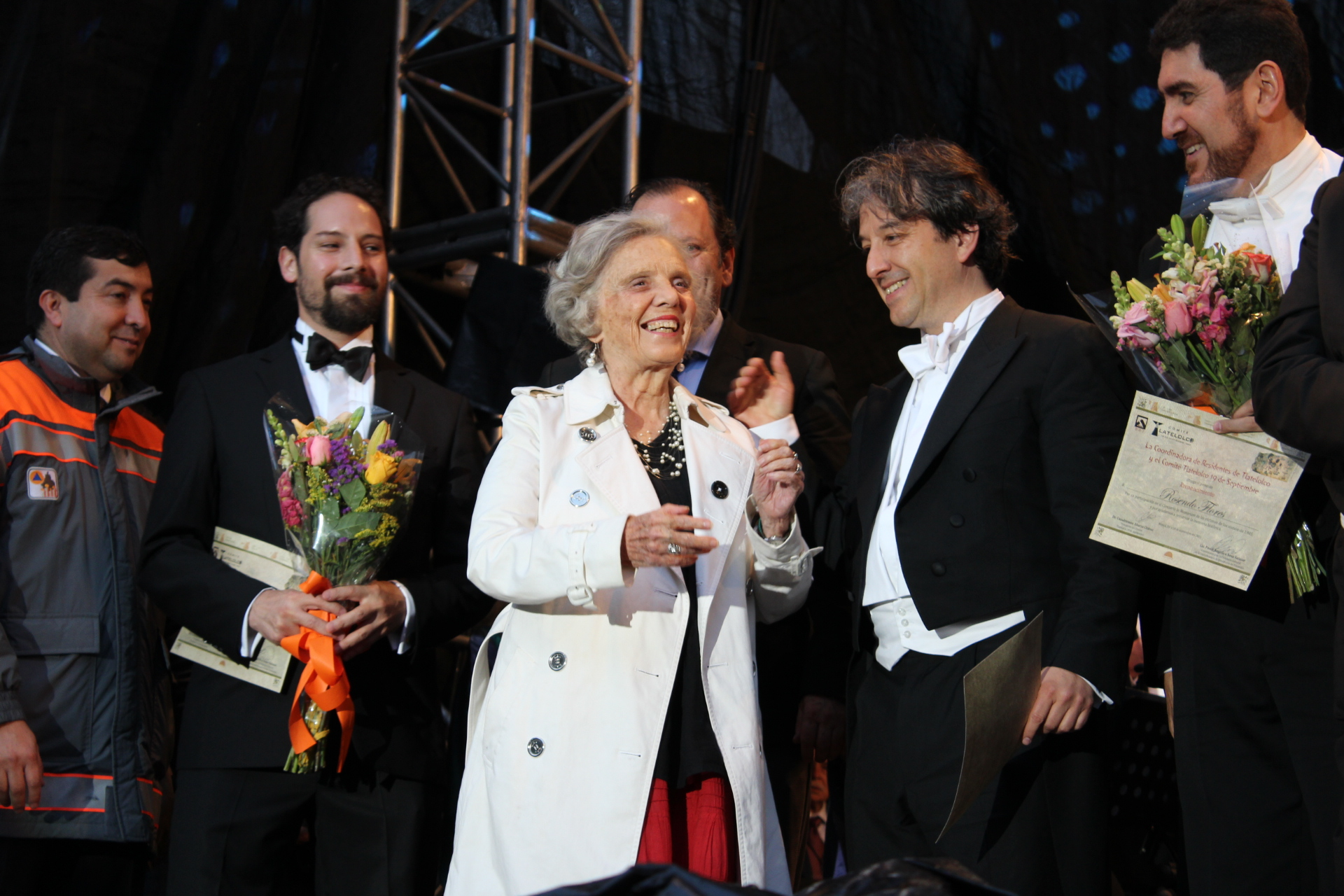 Plaza de las Tres Culturas, Tlatelolco, Ciudad de México.